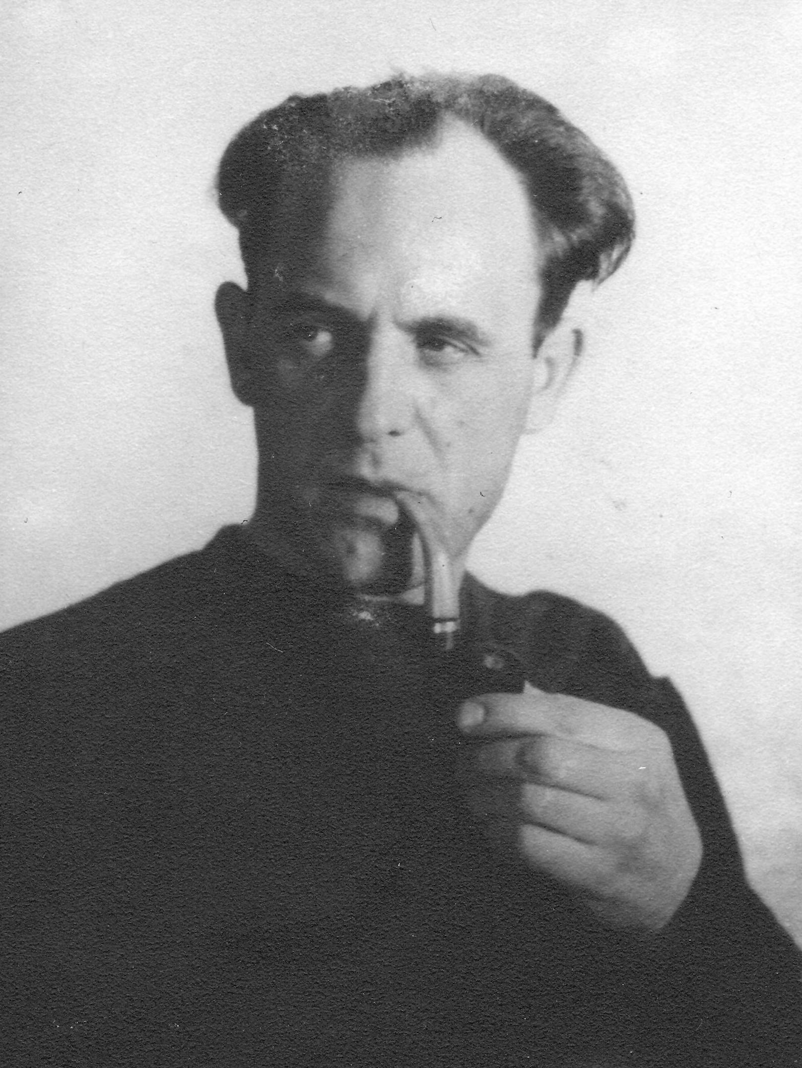 Porträtfoto von Kurt Bruno Herholz